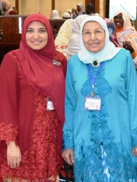 Amany Lubis and Nabilah Lubis saat Ikutserta dalam Konferensi International Muslim Women Union (IMWU) pada tanggal 7-10 Februari 2016 di Khartoum, Sudan.